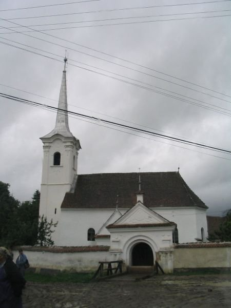 Magyarhermányi református templom, 2005